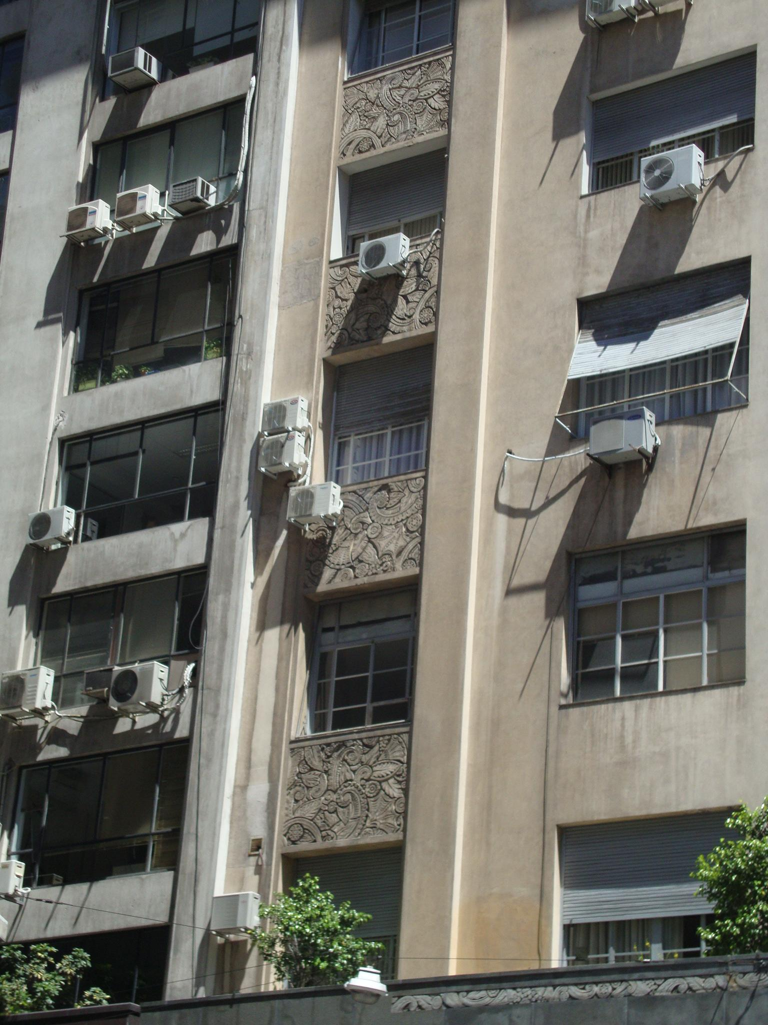 Relieves de diseño Art Decó en la fachada del Edificio Dorrego, en la Diagonal Norte de la Ciudad de Buenos Aires.